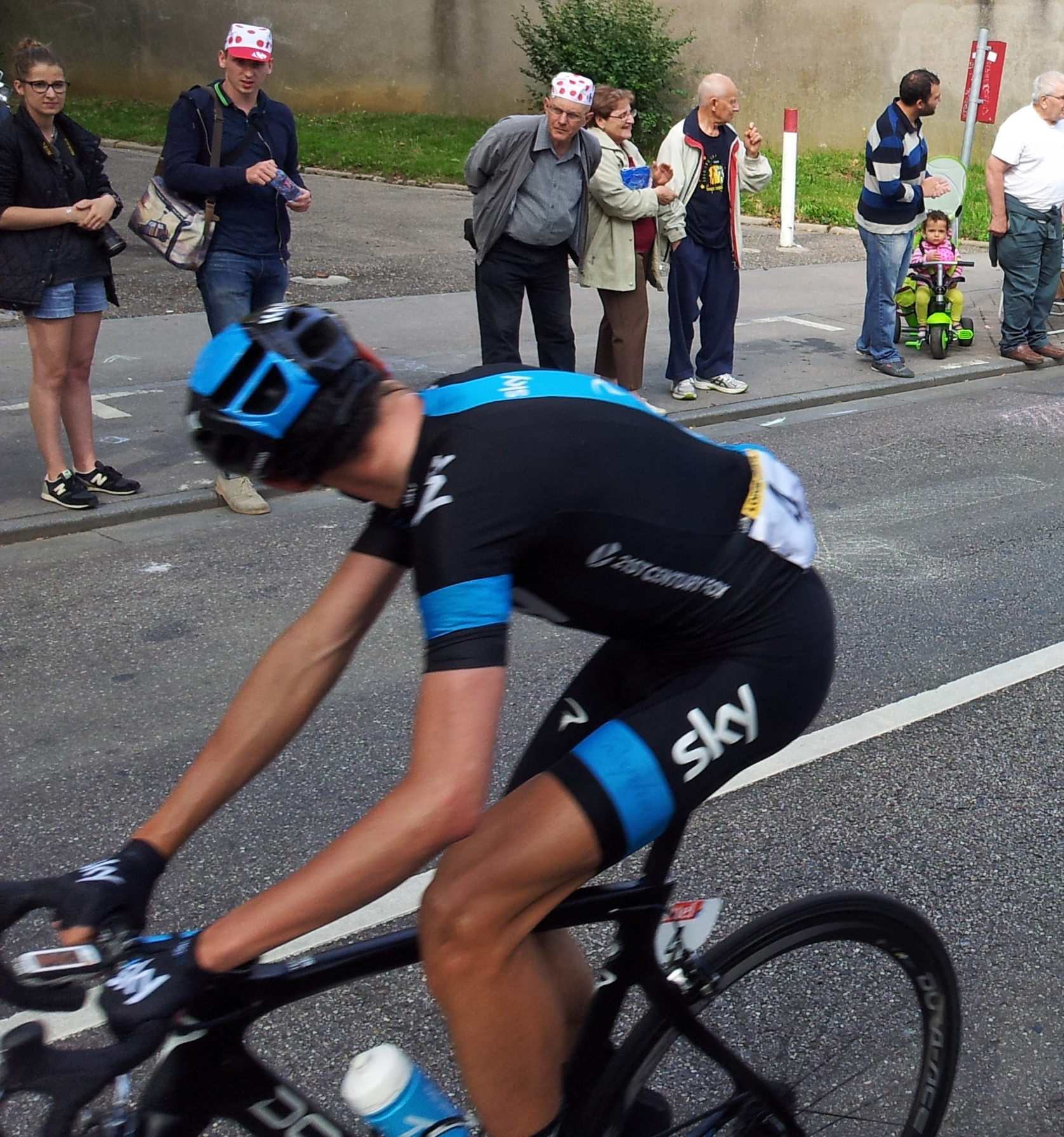 7e étape du Tour de France 2014 au début de la Côte de Boufflers.